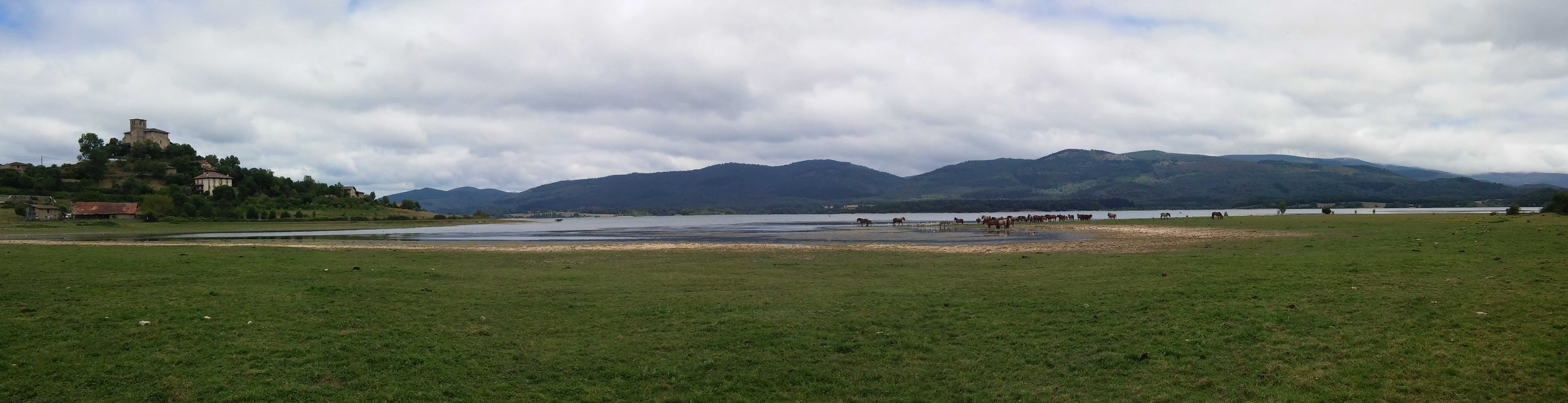 Langara Ganboa (Arratzua-Ubarrundia, Araba) eta Uribarri Ganboako urtegia